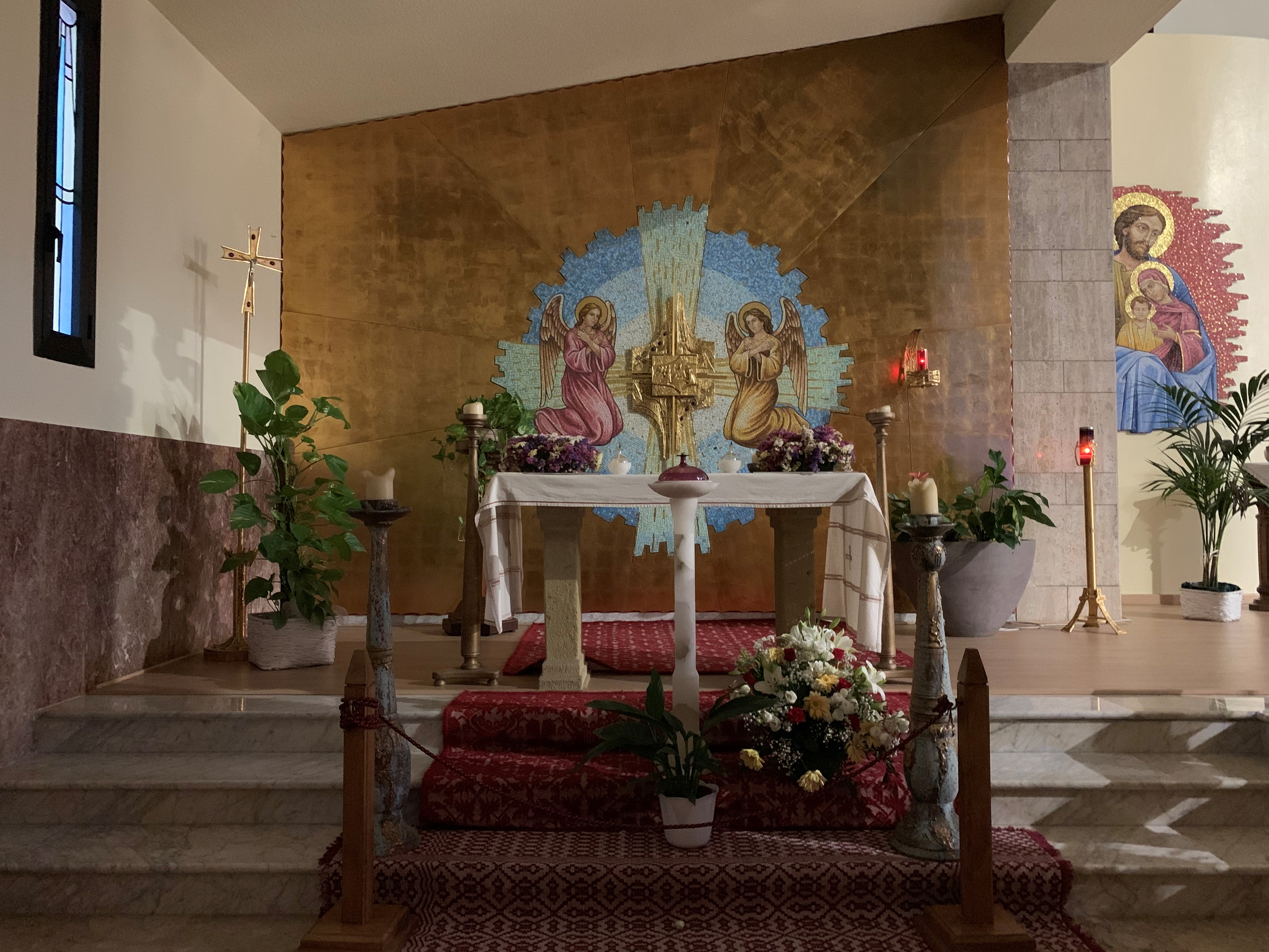 Navata laterale